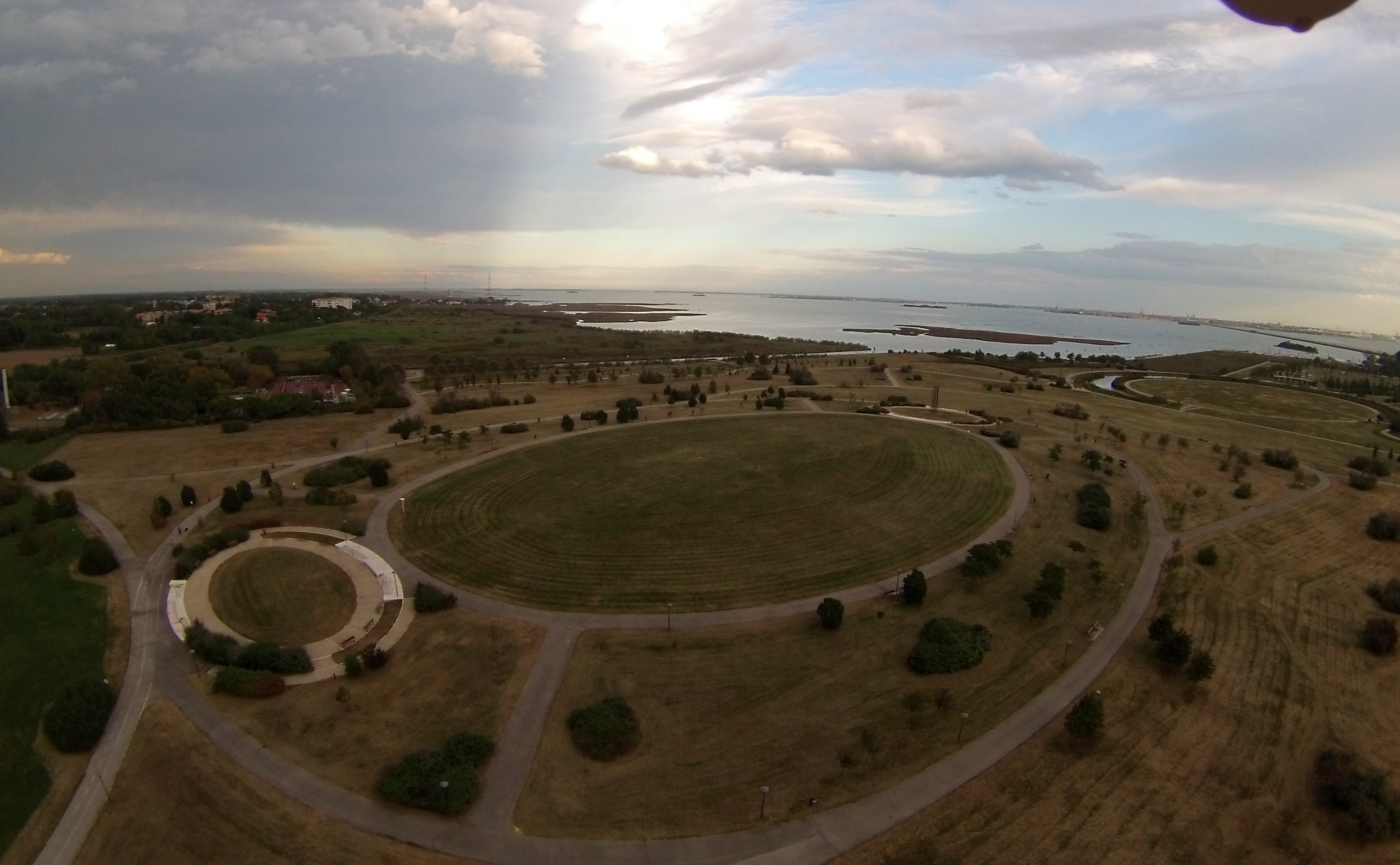 DRONE - Il parco San Giuliano dall'alto 2